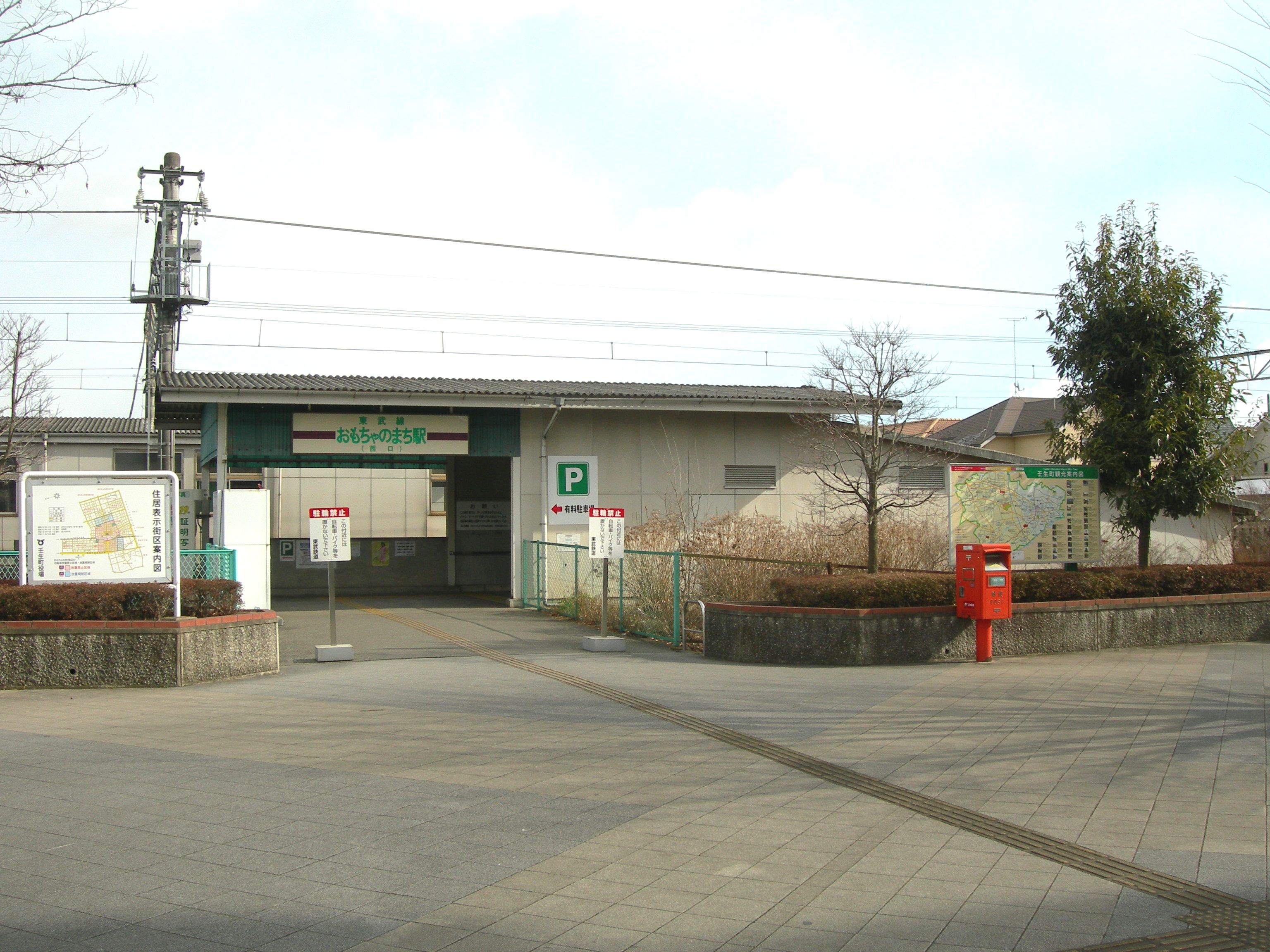 東武宇都宮線おもちゃのまち駅